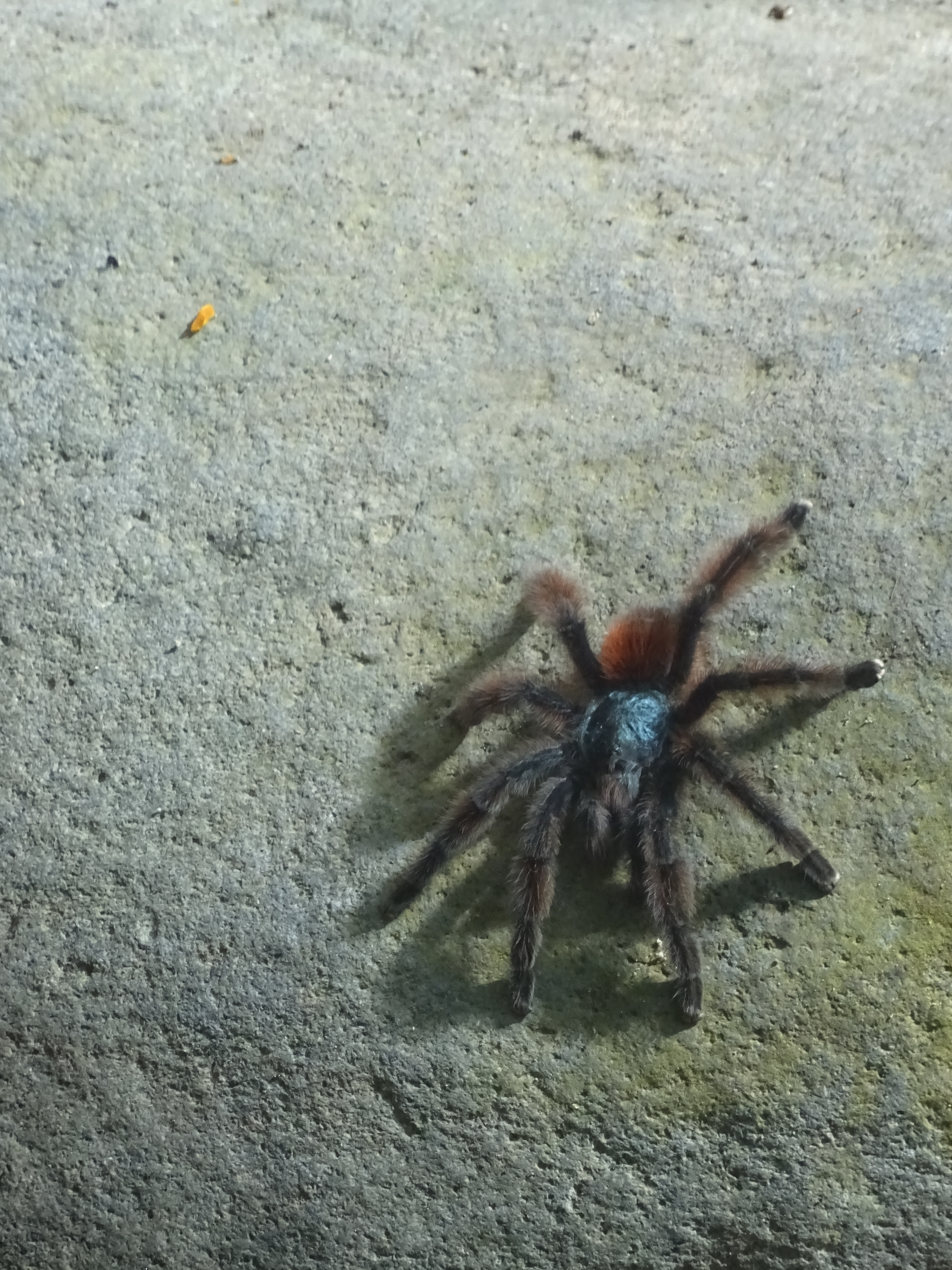 Martinique - Matoutou Falaise aperçue lors d'une randonnée vers l'Anse Couleuvre au nord de l'île